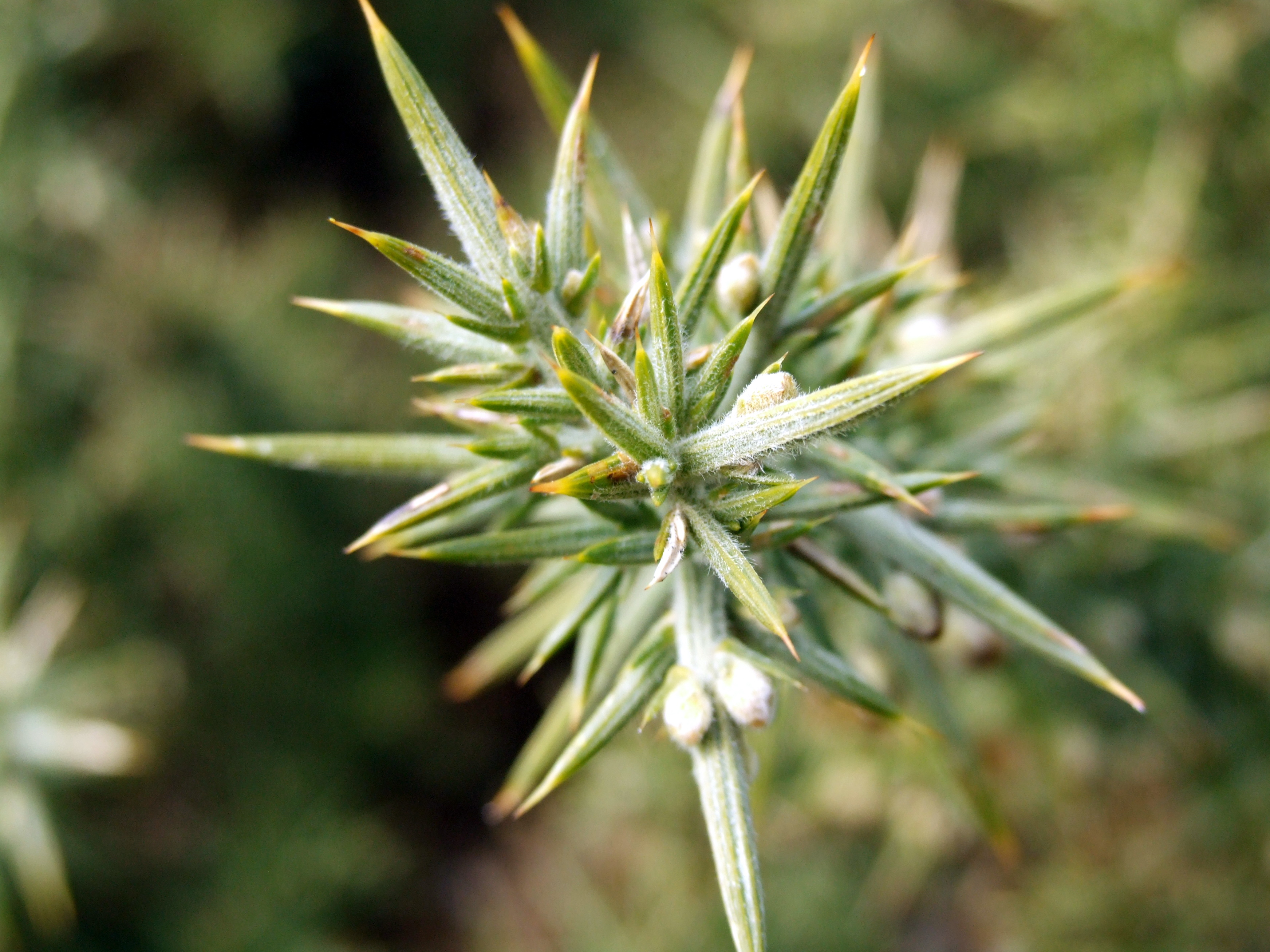 Deteilansicht Stechginster (Ulex europaeus); aufgenommen im Durlston Country Park, Swanage, Dorset, United Kingdom